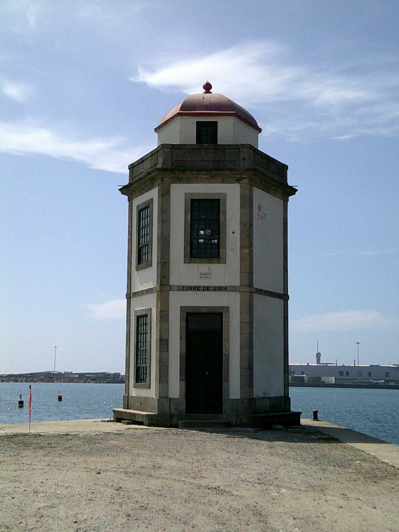 Torre de Vigia da Barra, freguesia de Monserrate, concelho e distrito de Viana do Castelo, Portugal.